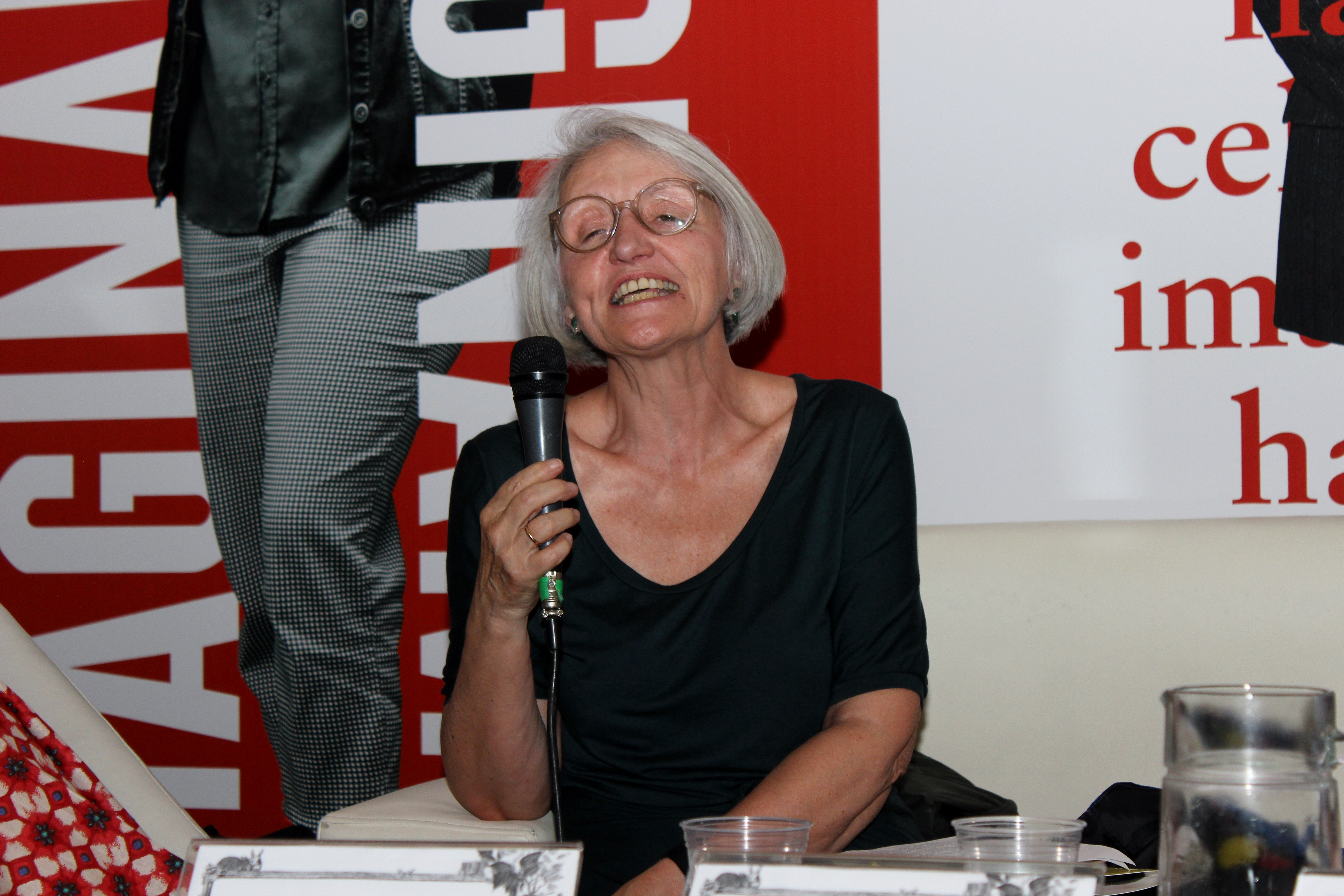 Constanza Mekis, presidenta de IBBY Chile, durante la presentación de la obra de Mari Ferrer y Jorge de la Paz Mensaje recibido, realizada en la Feria Internacional del Libro de Santiago 2018 (sala Lily Garafulic, 28 de octubre).